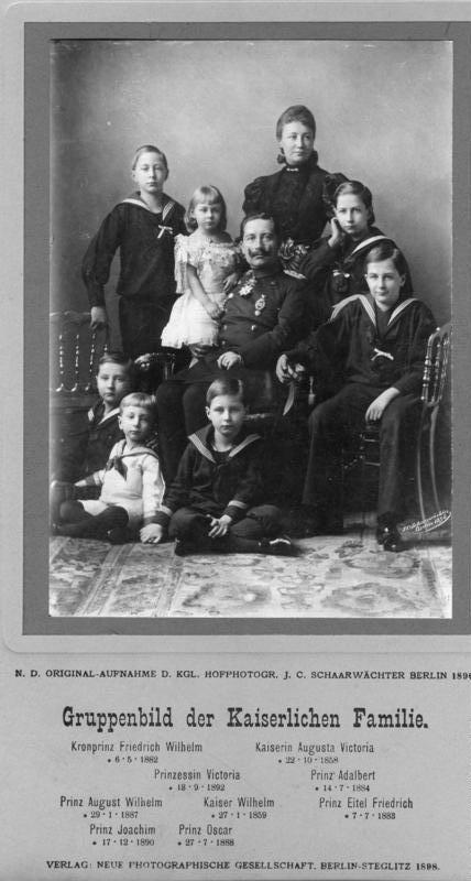 N.d. Original-Aufnahme d. kgl. Hofphotogr[aphen] J. C. Schaarwächter, Berlin 1896 Gruppenbild der Kaiserlichen Familie. Kronprinz Friedrich Wilhelm *6.5.1882 Kaiserin Augusta Victoria *22.10.1858 Prinzessin Victoria *18.9.1892 Prinz Adalbert *14.7.1884 Prinz August Wilhelm *29.1.1887 Kaiser Wilhelm *27.1.1859 Prinz Eitel Friedrich *7.7.1883 Prinz Joachim *17.12.1890 Prinz Oscar *27.7.1888 Verlag Neue Photographische Gesellschaft, Berlin-Steglitz 1898